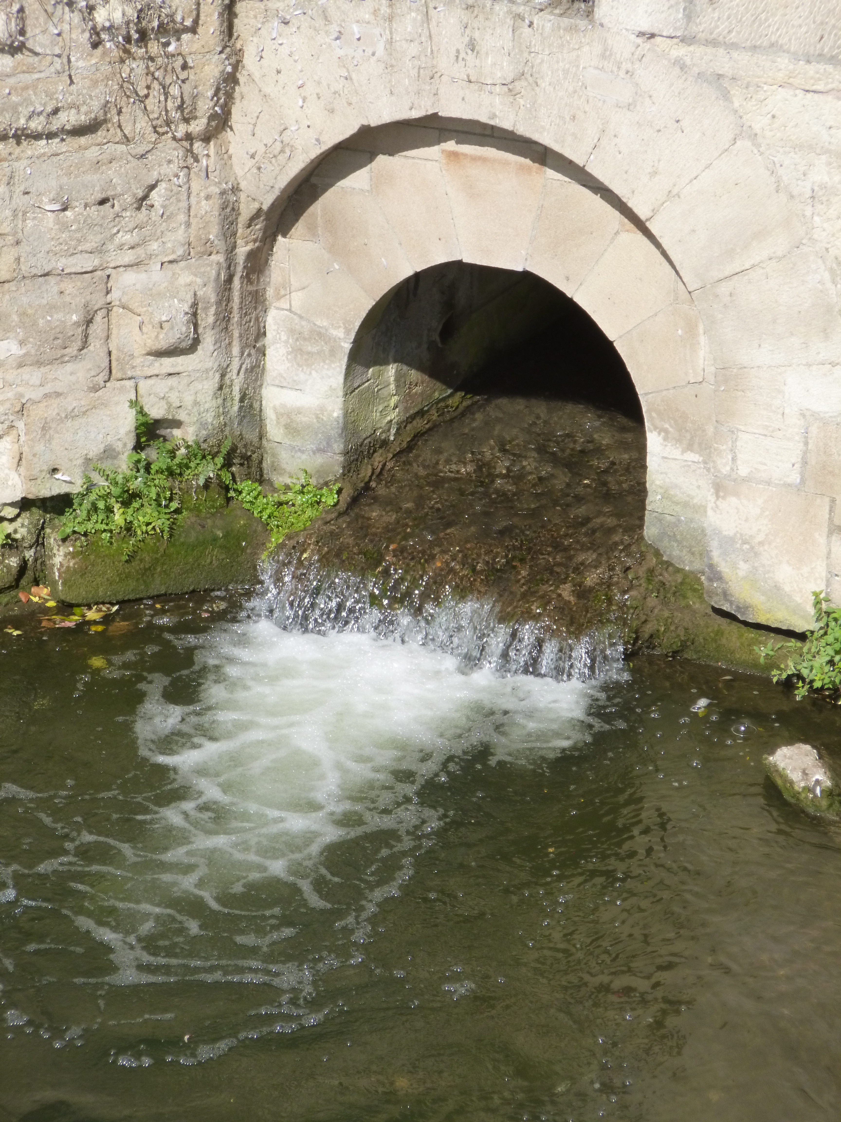 Mündung des Mühlkanals, einer Abzweigung des Ammerkanals, in den Neckar bei der Eberhardsbrücke in Tübingen